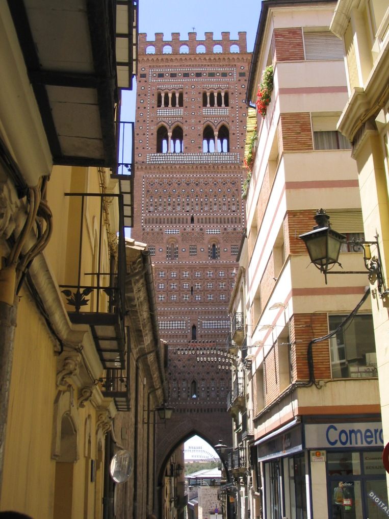 Torre mudéjar de Teruel, Aragón, españa.